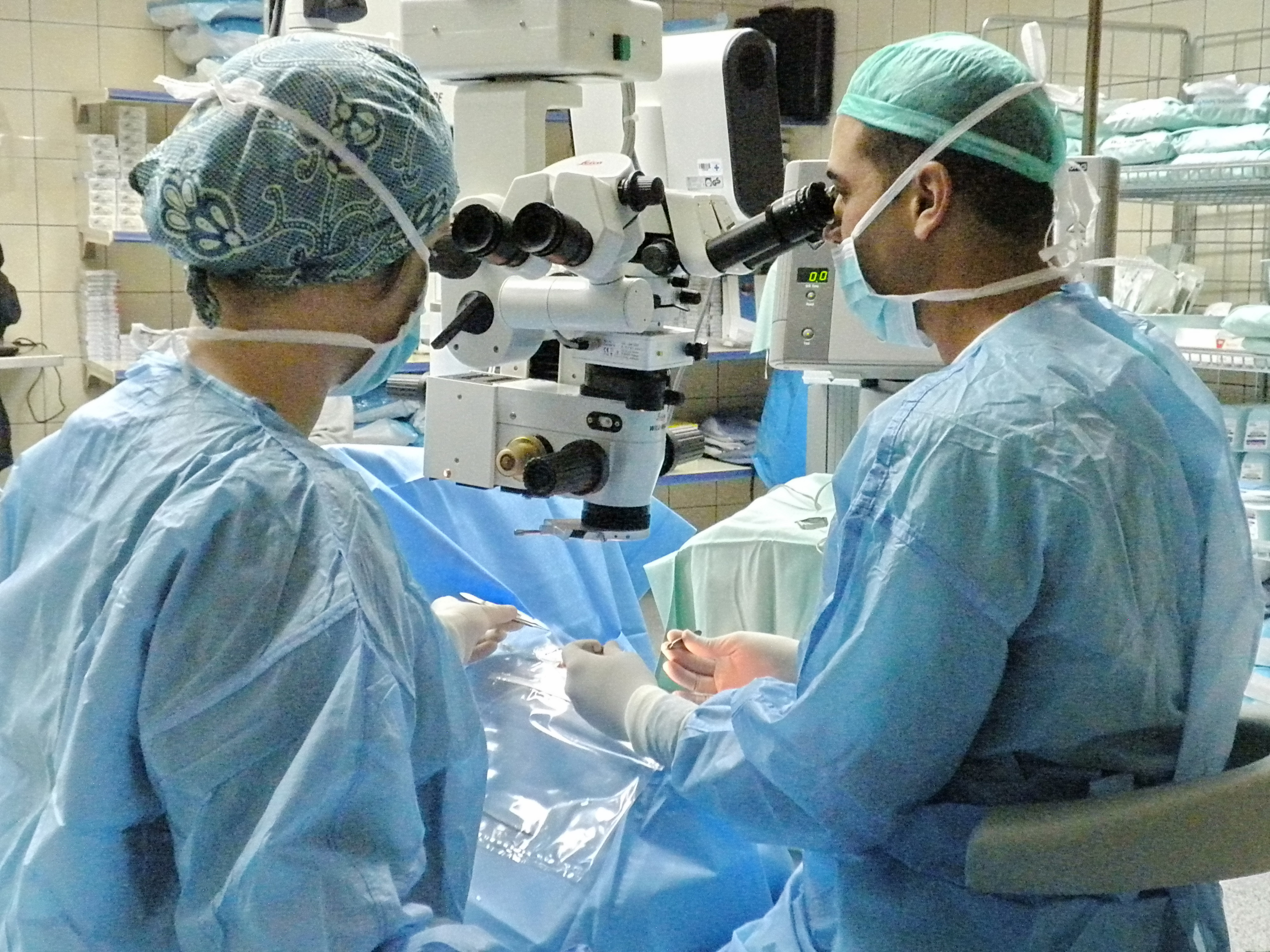 Fotografie einer Augenoperation im Centro Medico La Paz, Bata, Äquatorialguinea